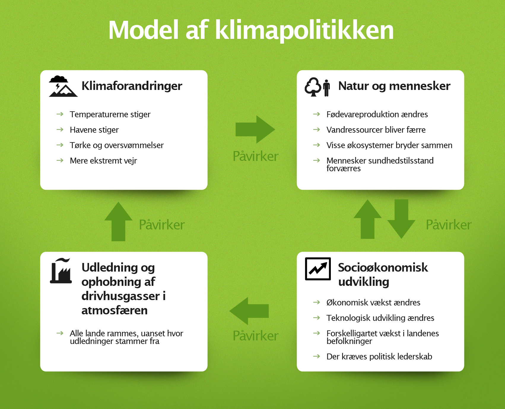 Model af Klimapolitikken, udviklet af CONCITO’s Klimaambassade, uploaded med samtykke i mail af 15. juli 2015 fra CONCITO v Stefan Straten